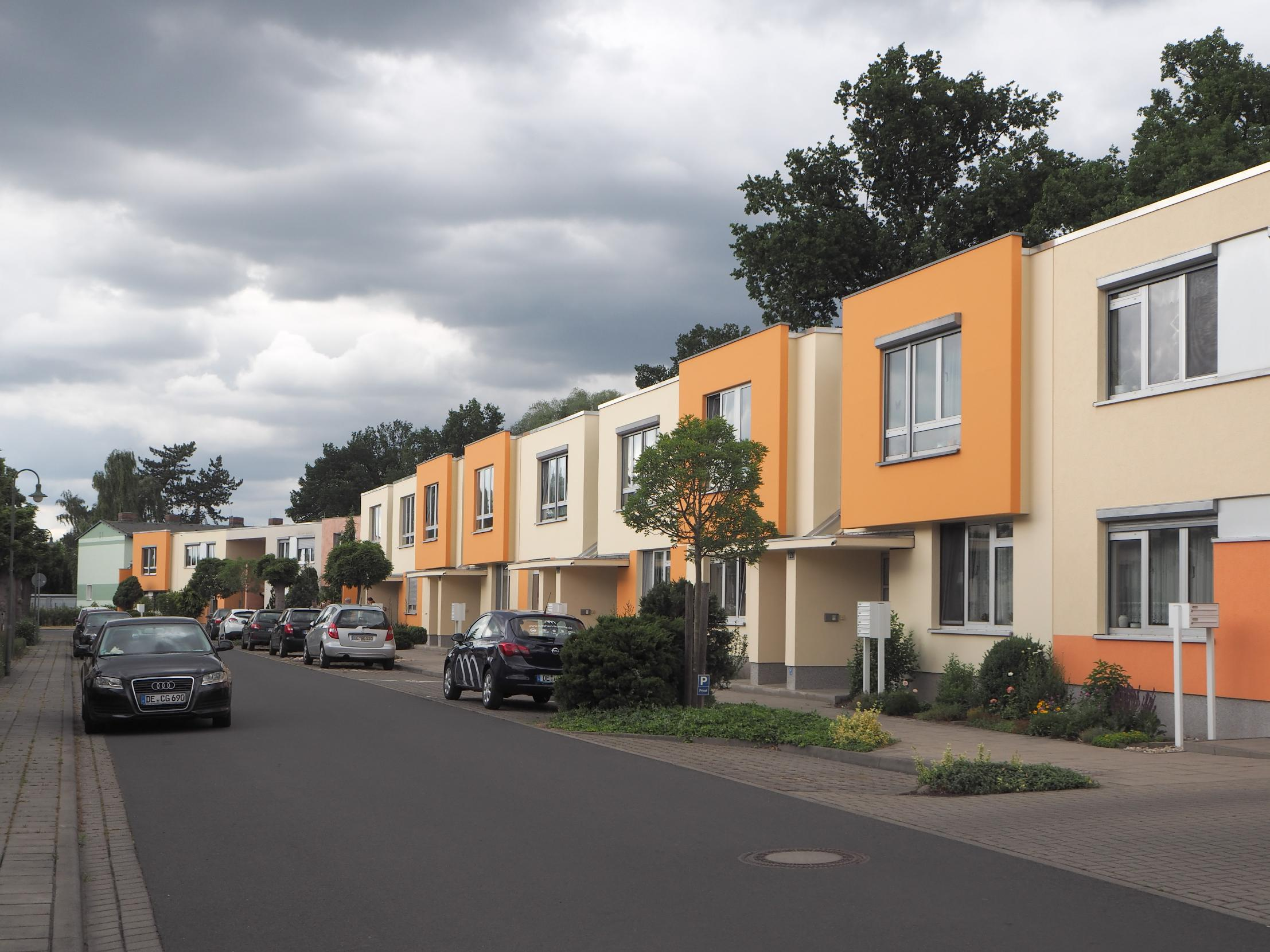 Dessau, Siedlung Törten, Neubauten am Rand der historischen Siedlung, Foto: Juni 2015